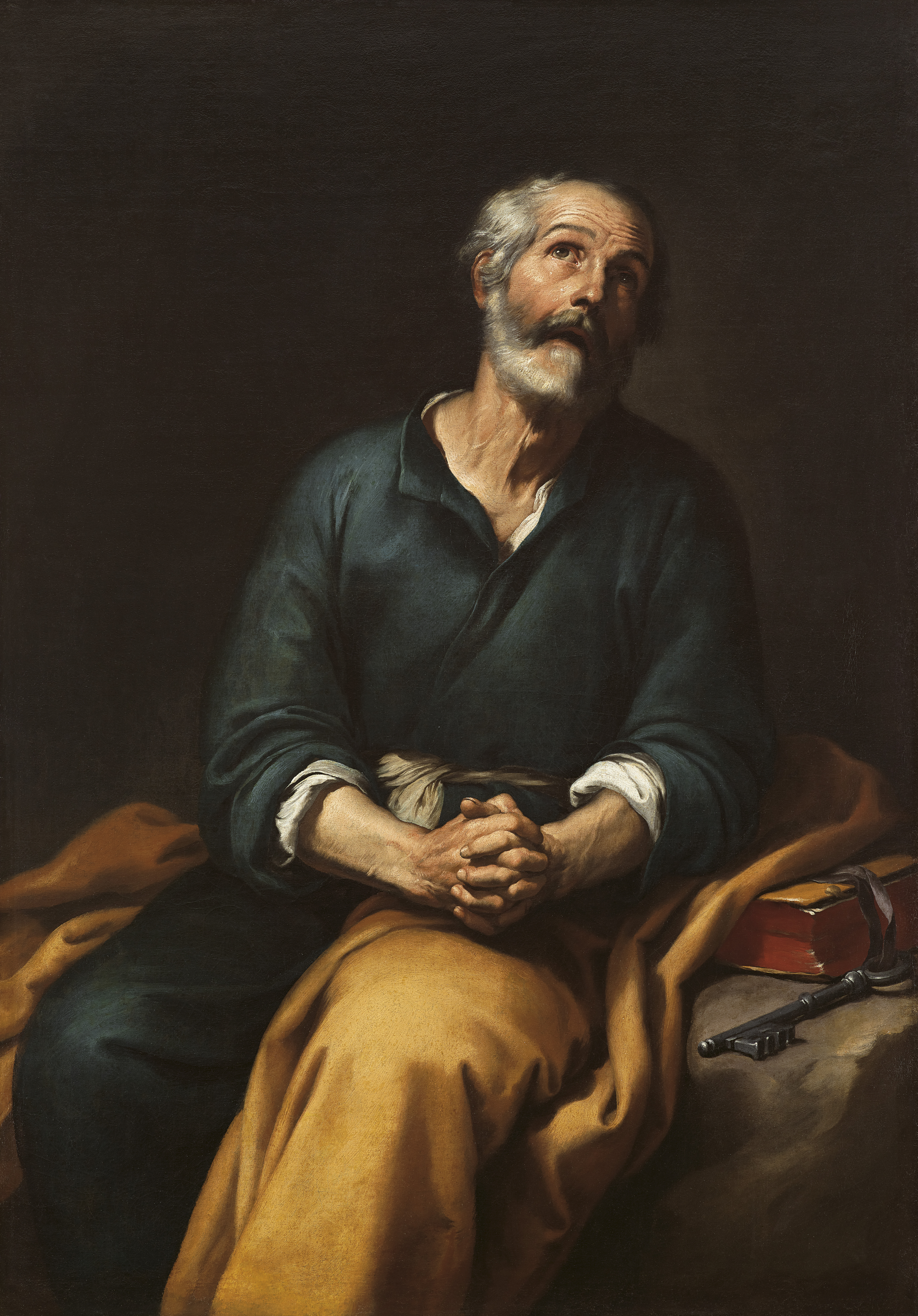 El lienzo representa a San Pedro Apóstol, primer papa de la Iglesia Católica y crucificado según la tradición en Roma durante el reinado del emperador Nerón. El apóstol aparece llorando por haber negado a Jesucristo tres veces en la noche anterior a la crucifixión de su maestro.